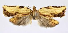 Isodemis stenotera female